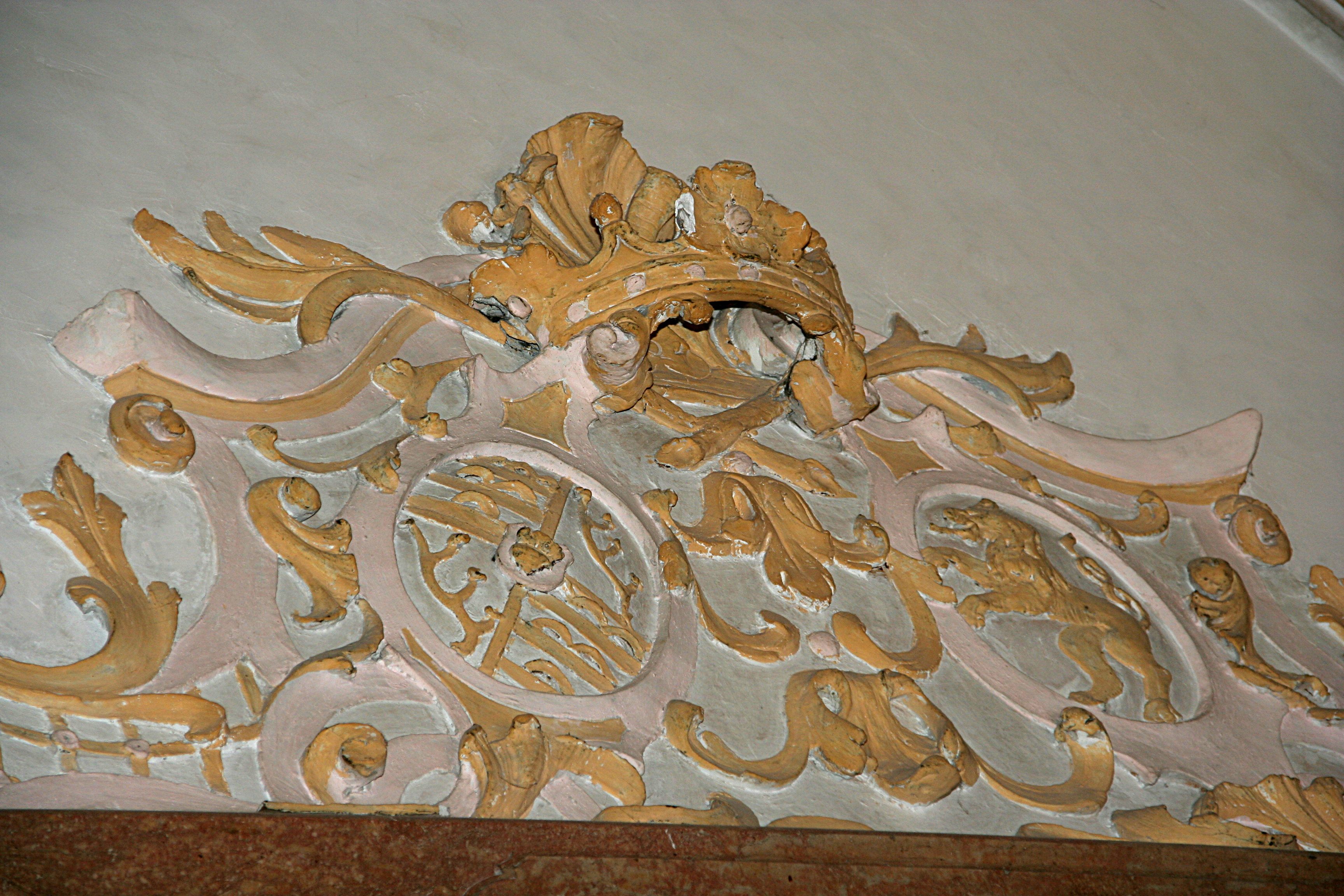 Stuck im Schloss Leopoldskron Salzburg